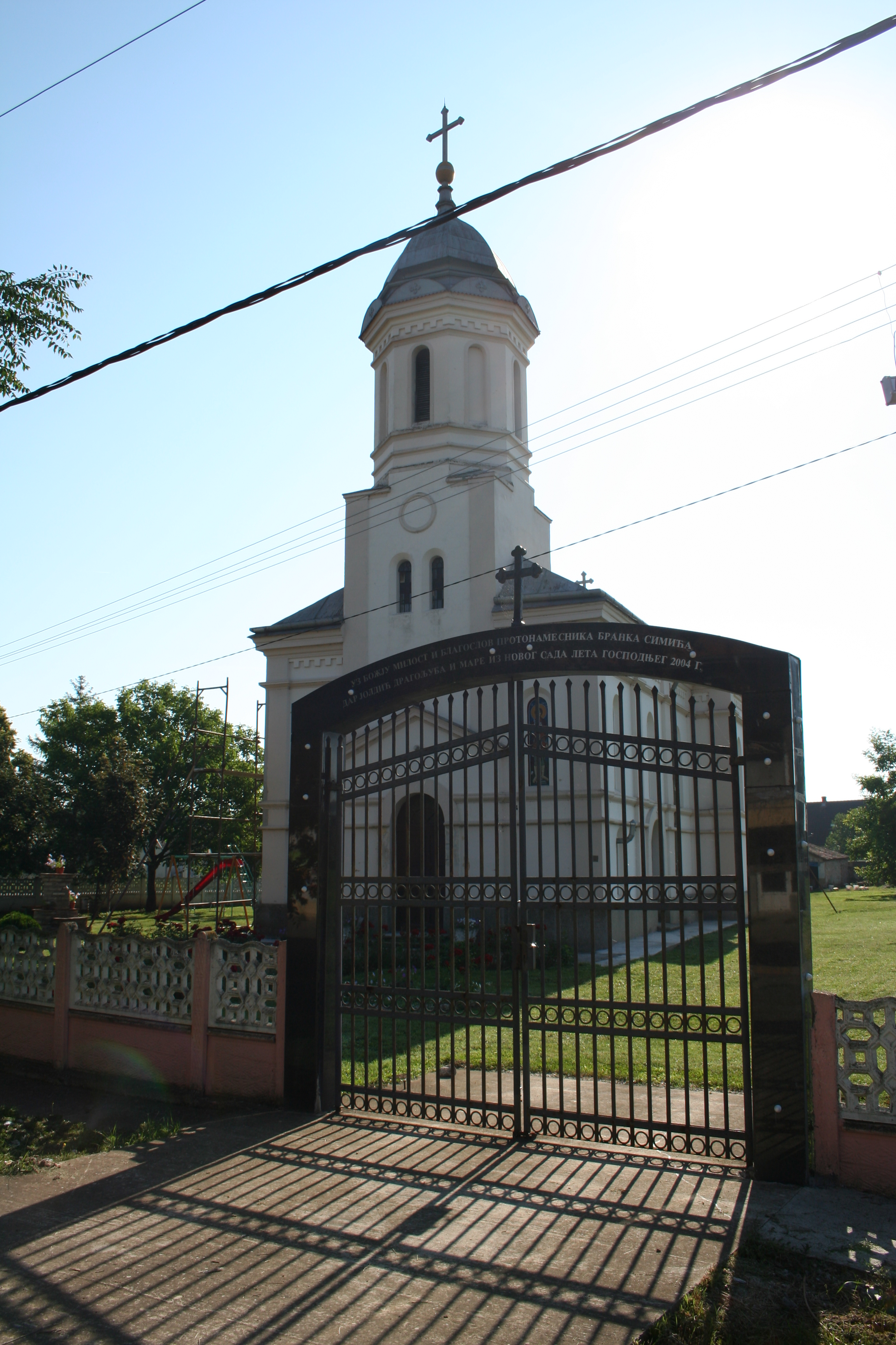 Crkva Uspenja Presvete Bogorodice, Ševarice